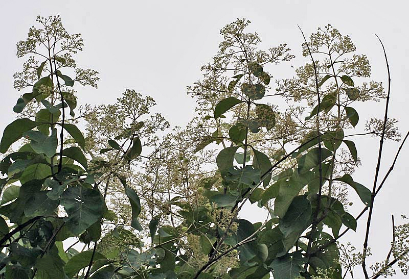 Teak or Sagwan Tectona grandis in Kolkata, West Bengal, India.